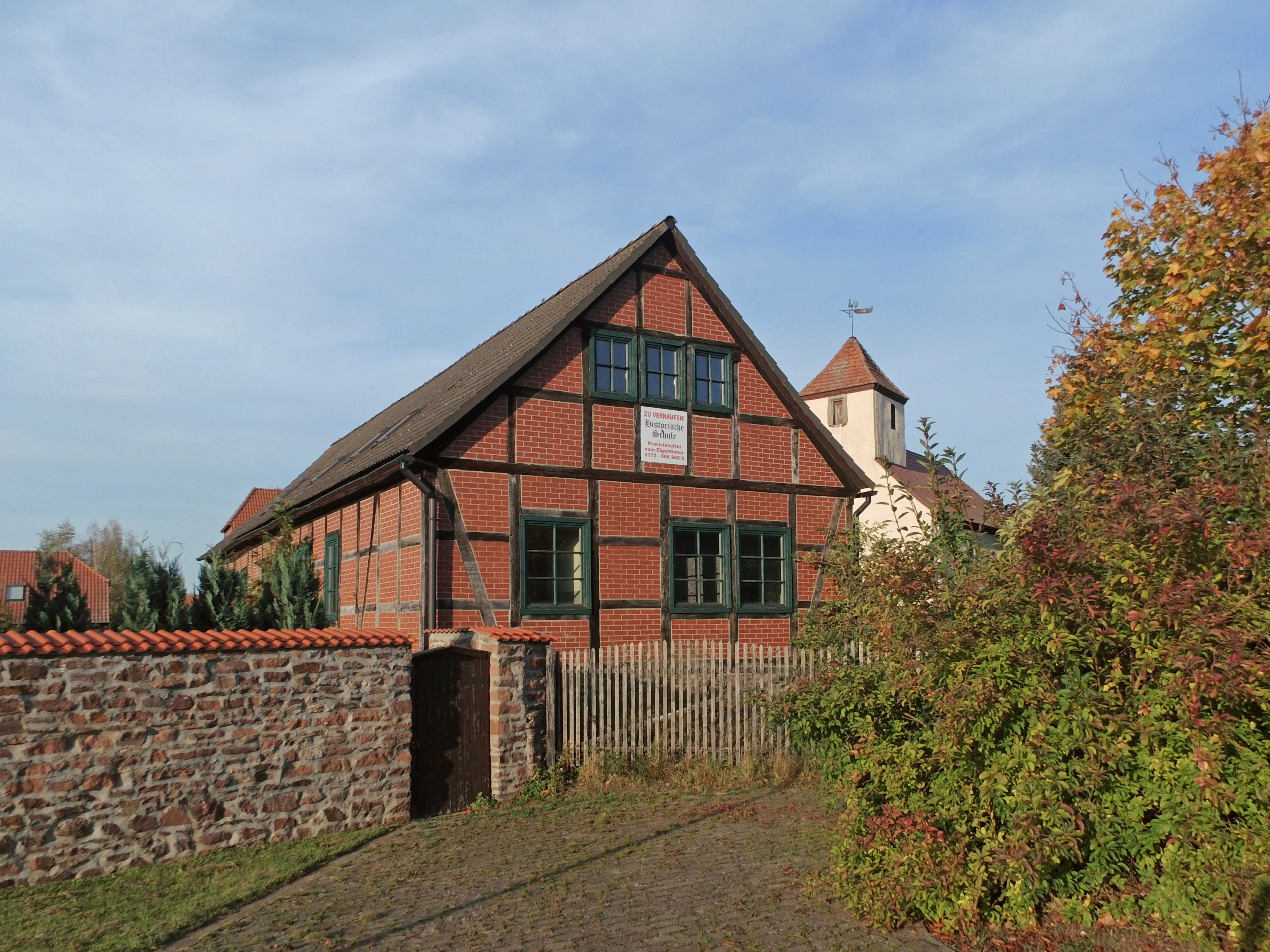 Ehemalige Schule in Everingen, rechts im Hintergrund evangelische Kirche